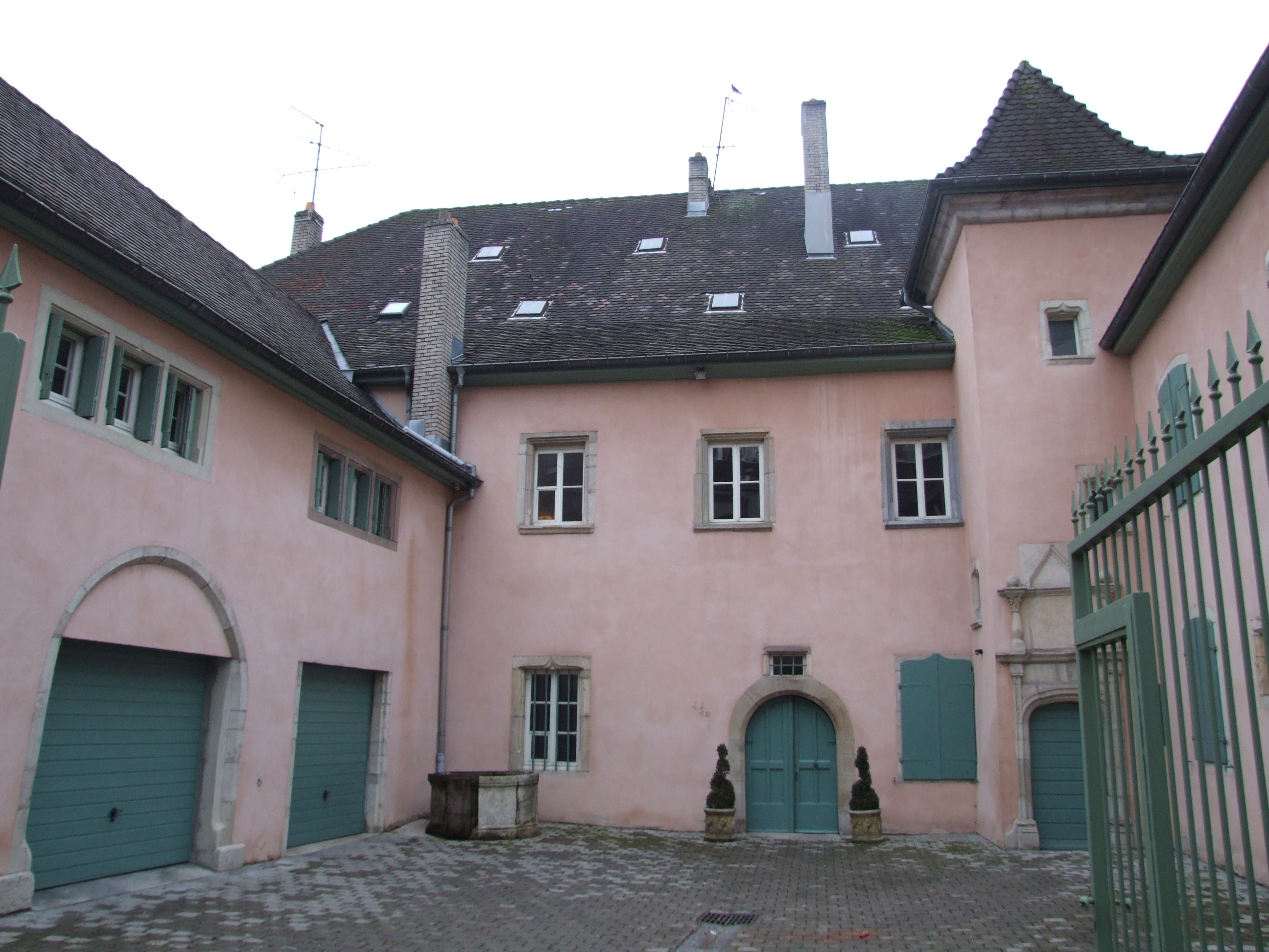 Montbéliard, Doubs, Franche-Comté, FRANCE